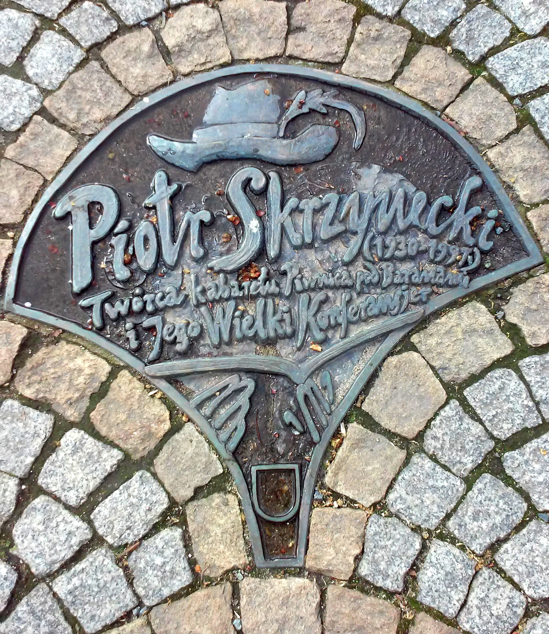 Legnica, Aleja Gwiazd Satyrykonu, tablica pamiątkowa - Piotr Skrzynecki